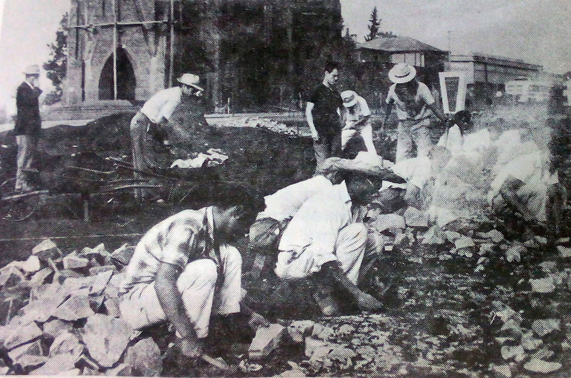 Empedrado llegando a las primeras calles de Oberá. En la imagen puede observarse la intersección de las avenidas Sarmiento y Libertad y en el fondo la Iglesia San Antonio en plena construcción.